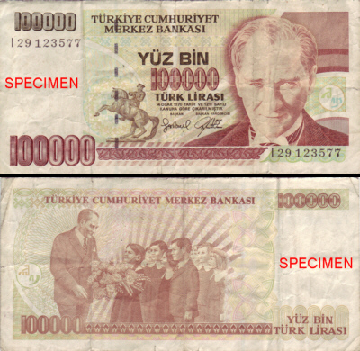 Turkey, 100.000 (old) Lira